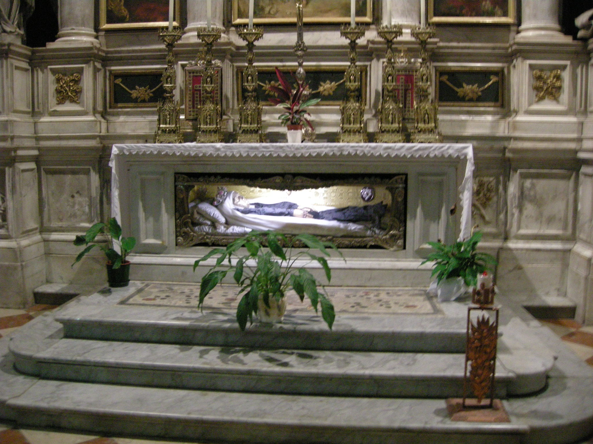 Duomo di udine, beata elena valentinis